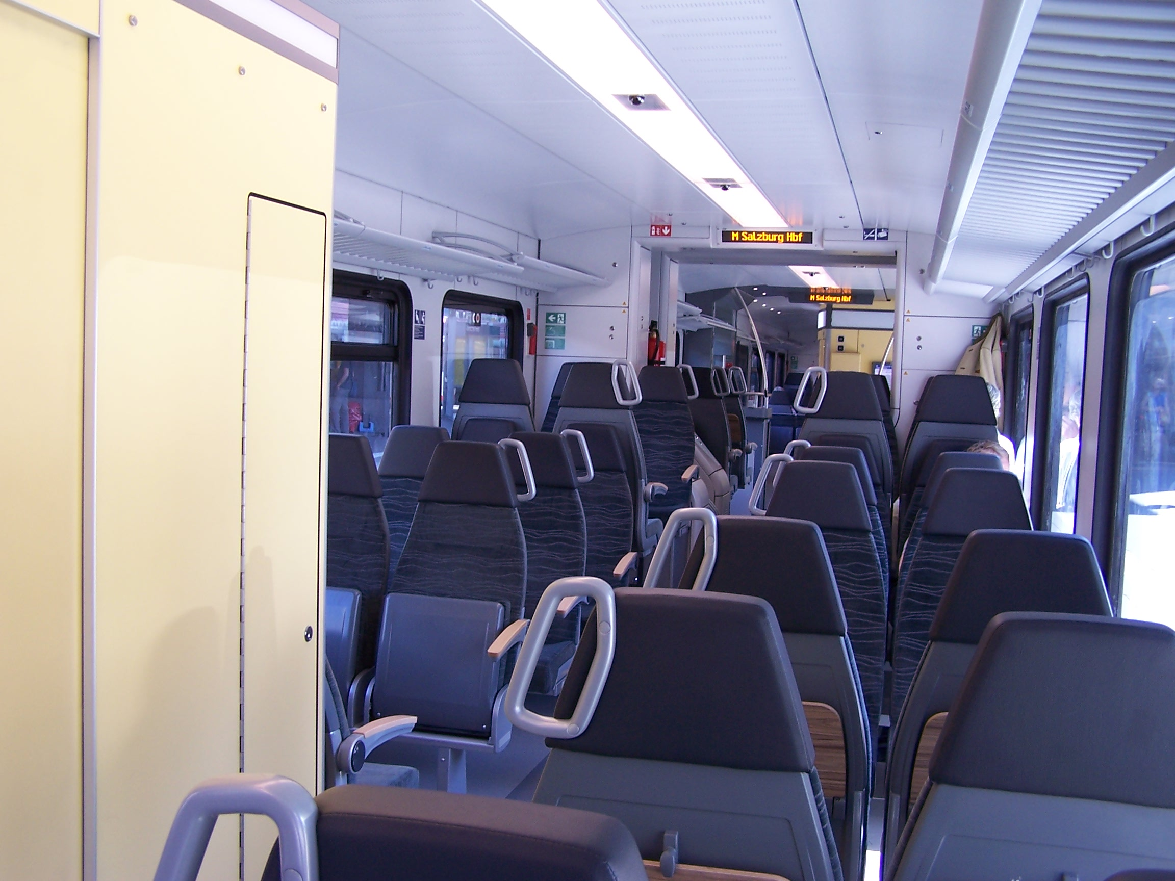 Innenraum des Meridian der BOB